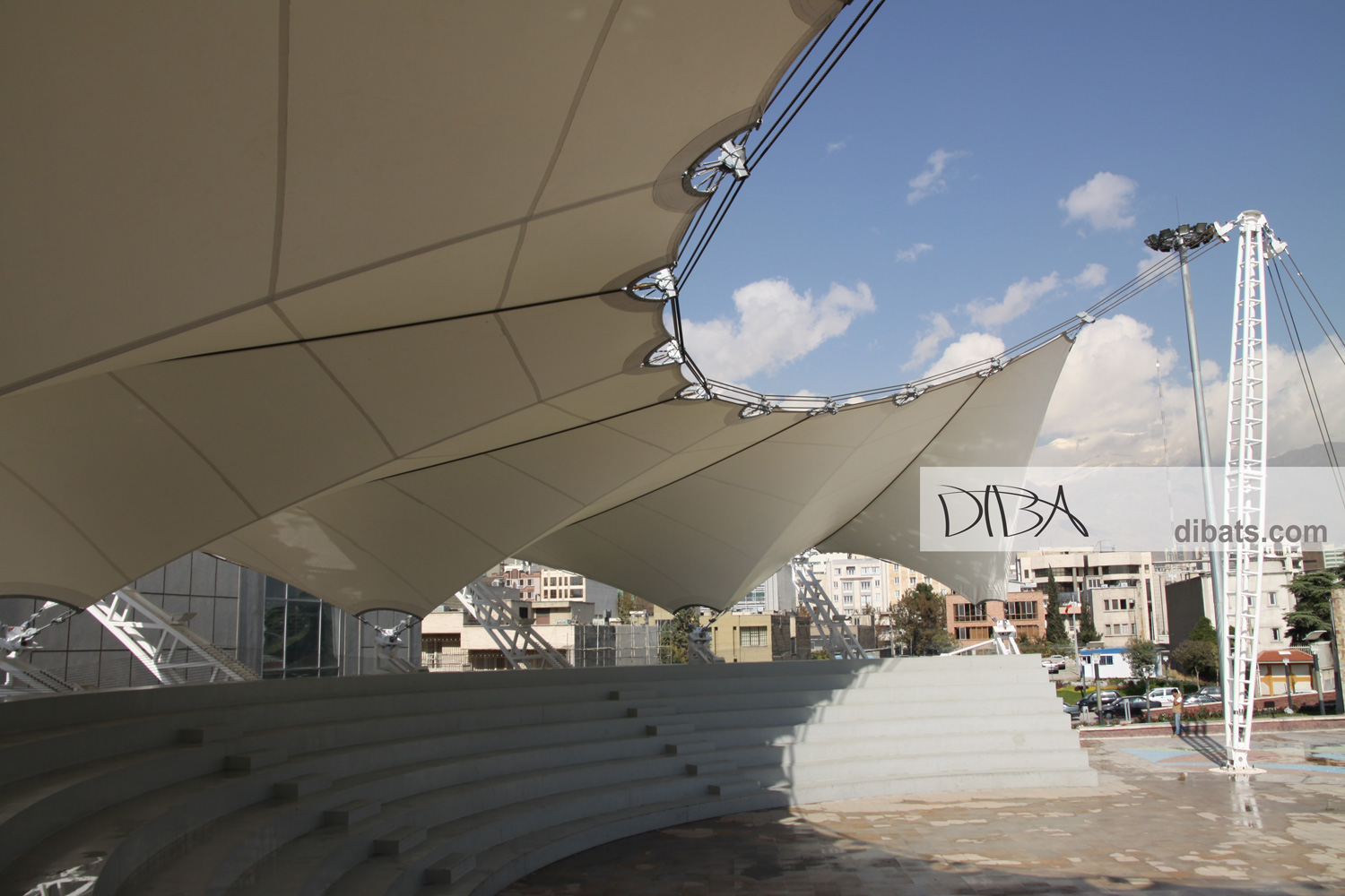 سازه غشایی (سازه چادری) بوستان آب و آتش تهران